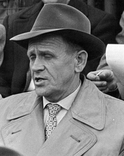 Zentralbild-Beyer Bey-Ho. 30.5.1956 Westdeutsche Olympia-Auswahl im Fußball - Der DFB (Fußball-Verband der Bundesrepublik) hat folgende Amateurspieler für die Olympischen Sommerspiele in Melbourne in Betracht gezogen. UBz: Der Bundestrainer Sepp Herberger (rechts) im Gespräch mit dem Staatstrainer der DDR, Oswald Pfau.